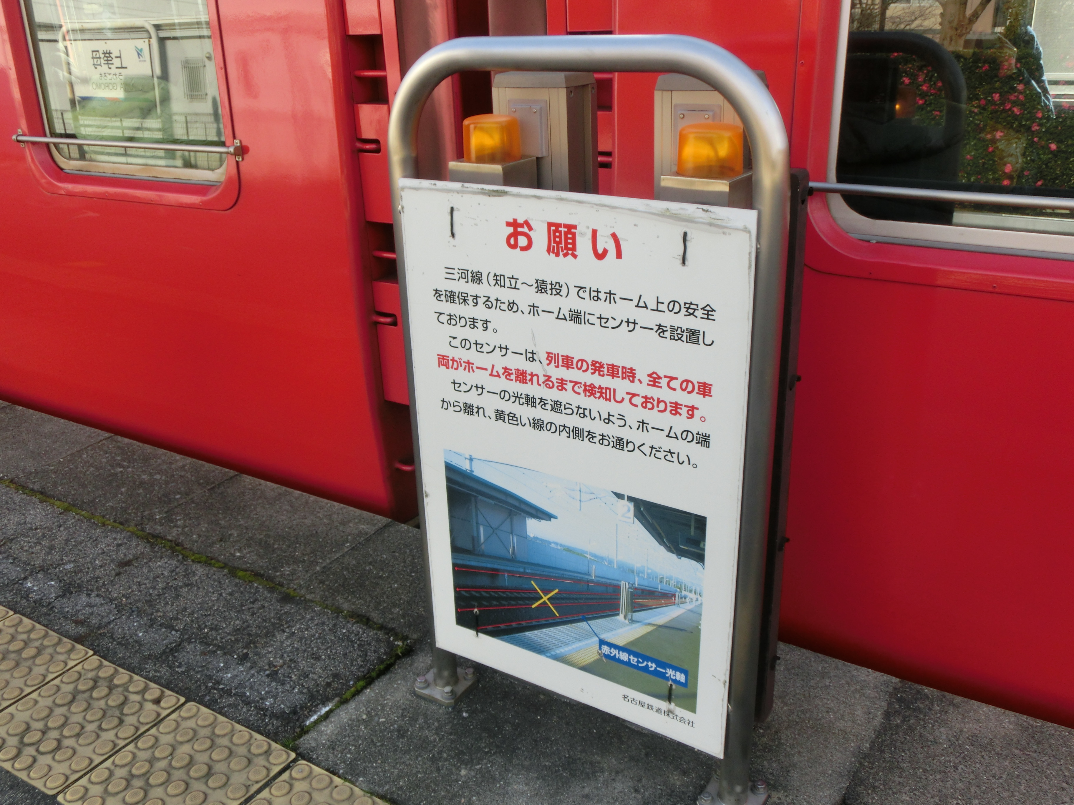 山線区間の猿投、豊田市、知立の三駅を除く駅に設置されているホームセンサー。